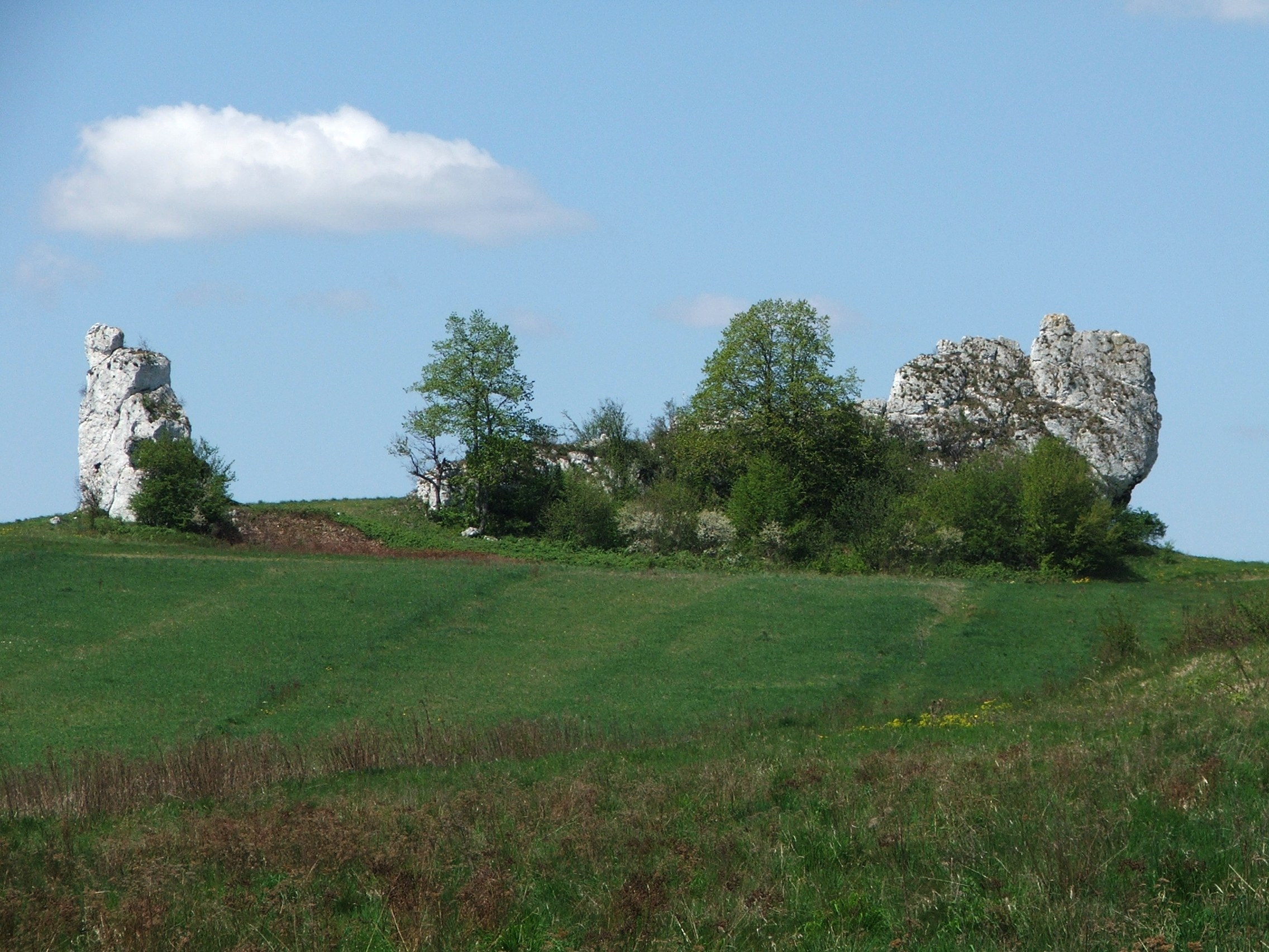 Skały Palec i Soczewka w Jerzmanowicach